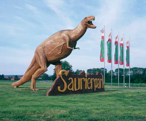 Saurierplastik an der Einfahrt zum Saurierpark